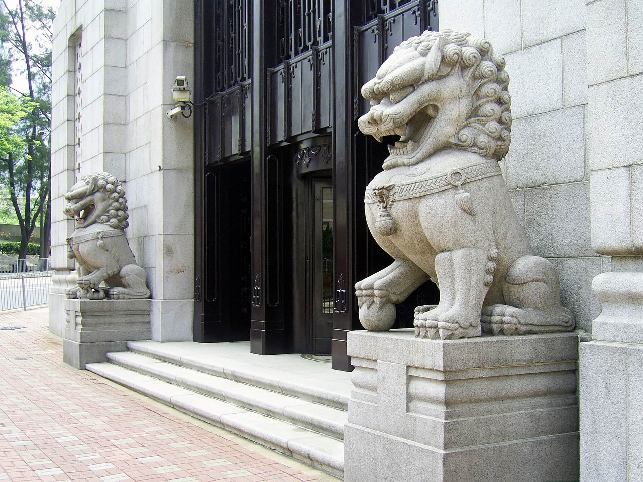 中國銀行大廈中式石獅把守大門